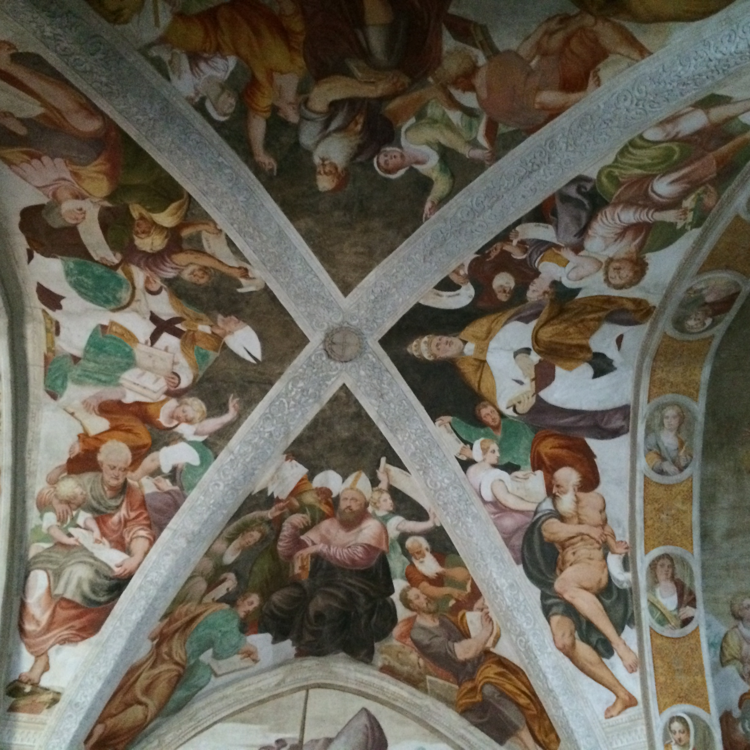 Baseglia